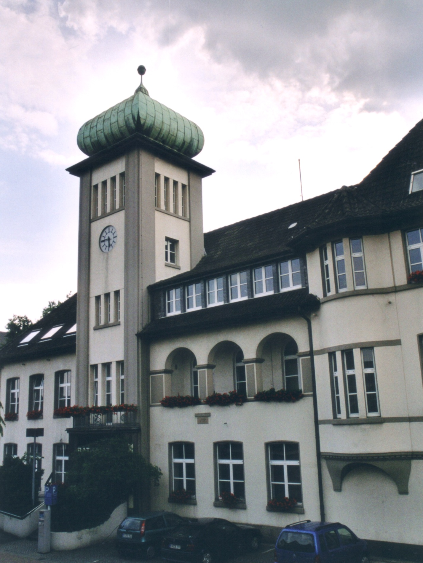 Das Rathaus in Herdecke